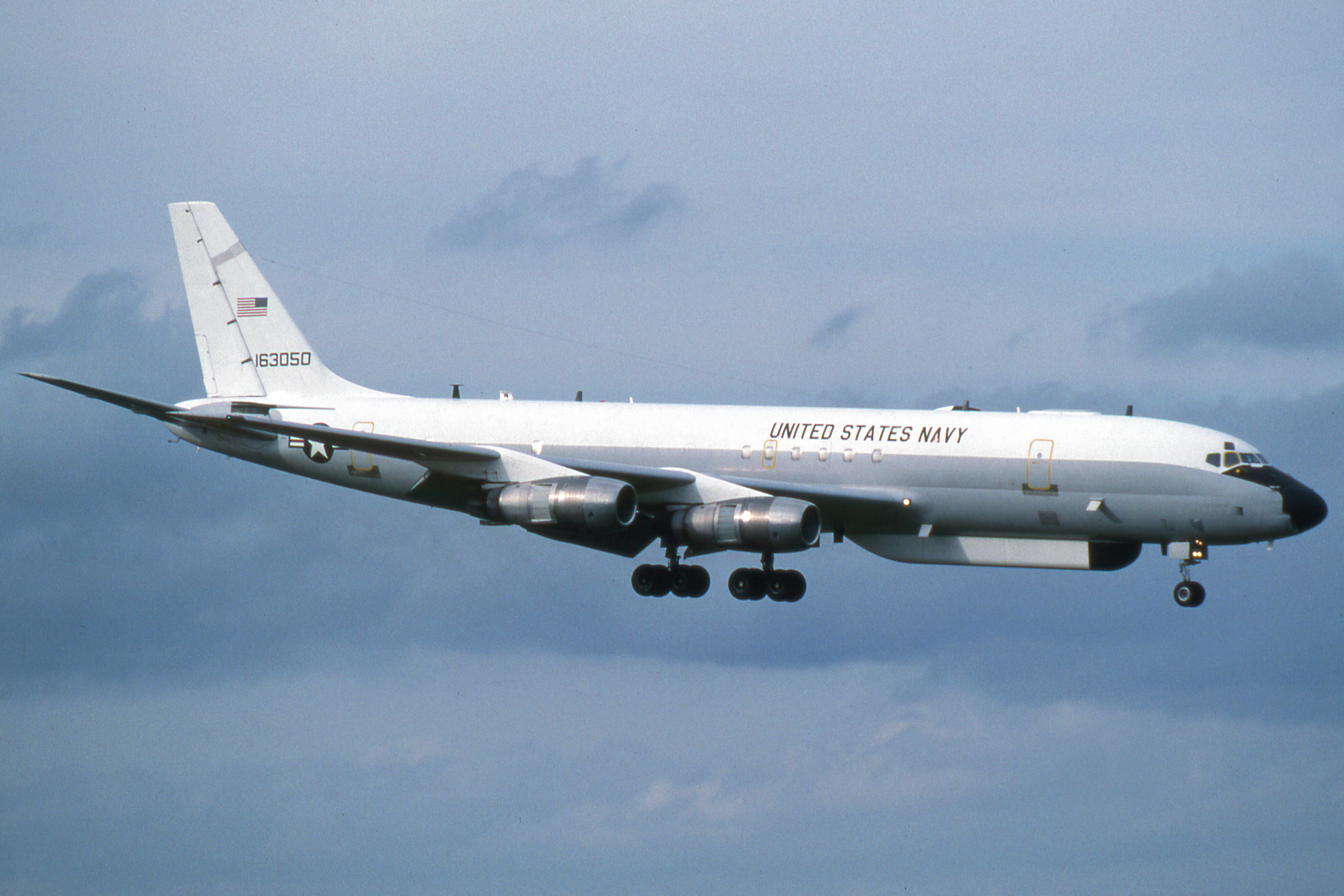 1987/88 Honolulu Hawaii